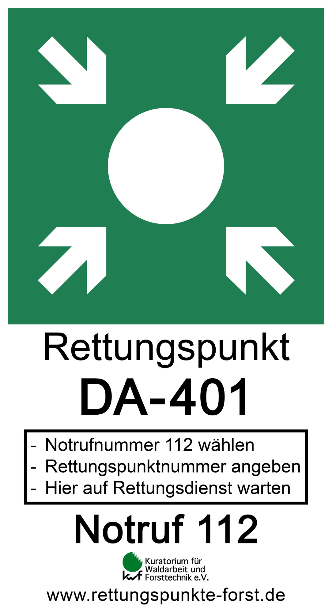 Empfehlung des KWF zu Schildern von Rettungspunkten